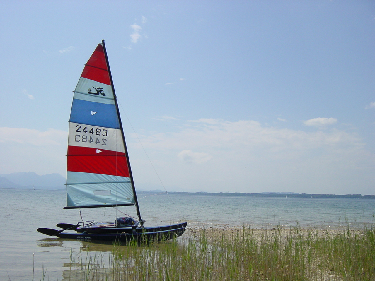 Chiemsee am Ostufer bei Schützing (Chieming)